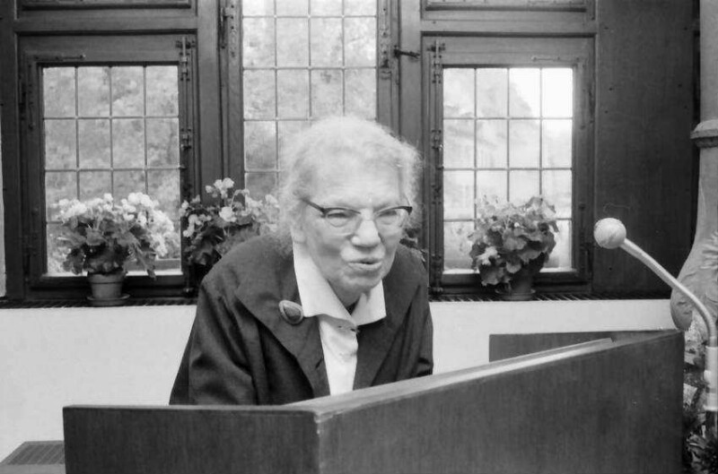 Ehrung Gertrud Luckner